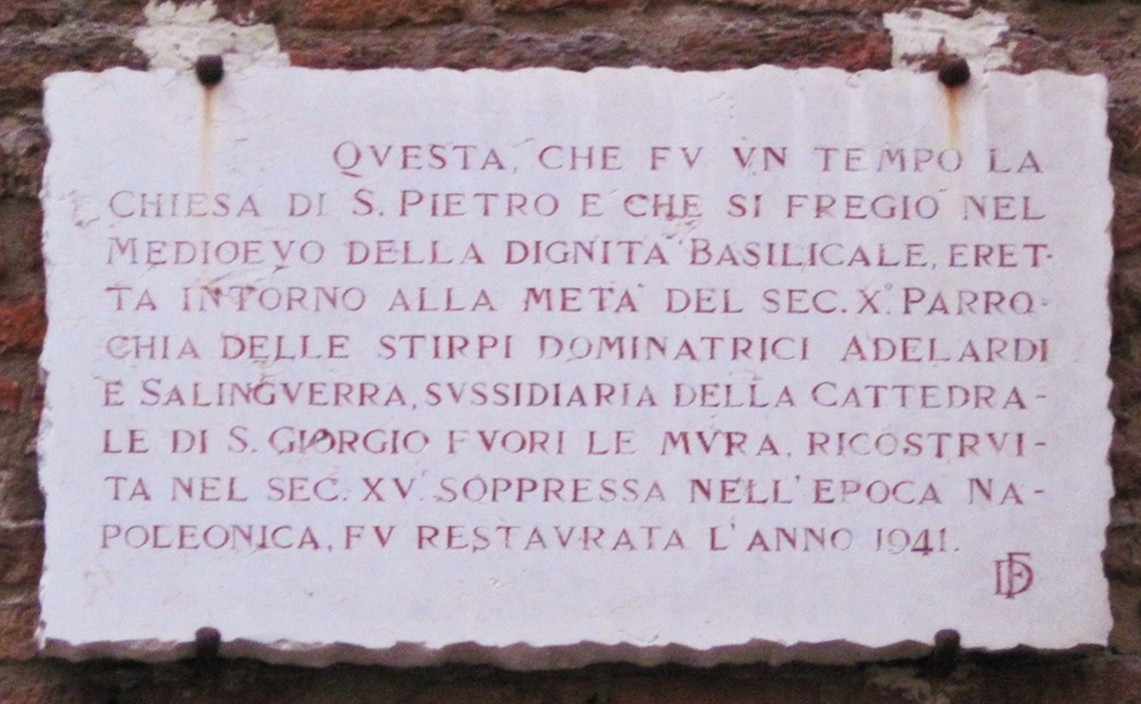 Chiesa sconsactata di San Pietro, a Ferrara. Ora è un cinema a luci rosse